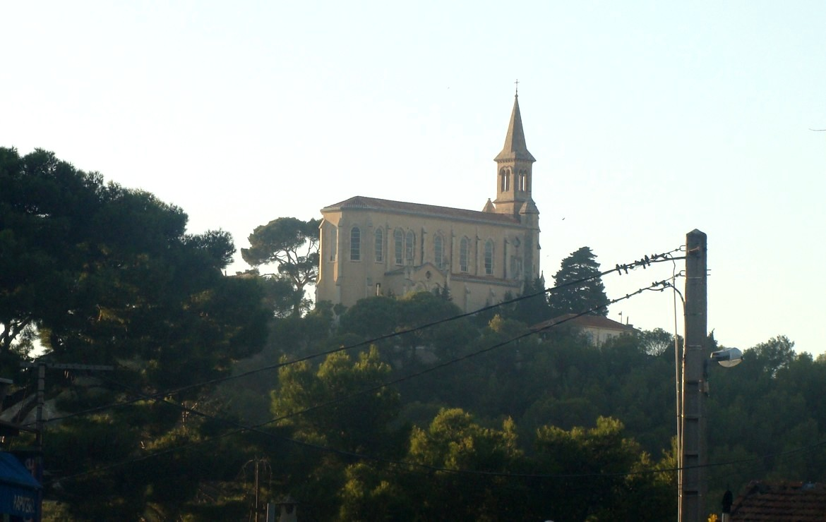 La chapelle Saint-Joseph, sur la colline du même nom, dans le quartier du Redon (Marseille, 9e arr.)